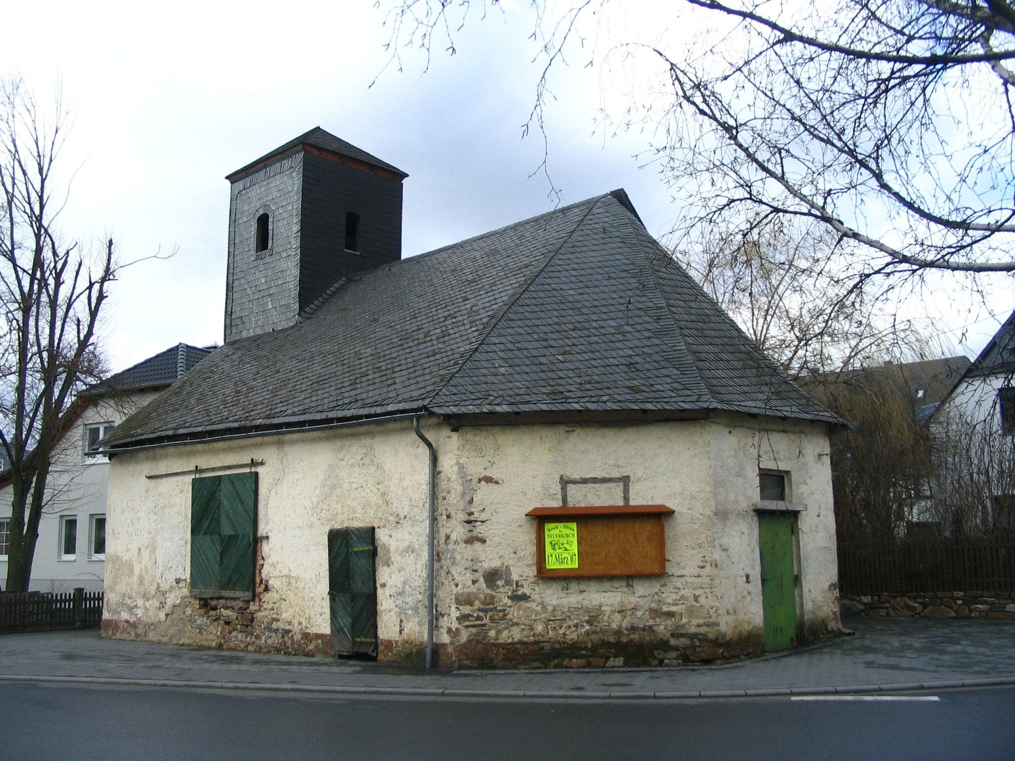 Ehemalige Woppenrother Kirche, später Raiffeisenlager